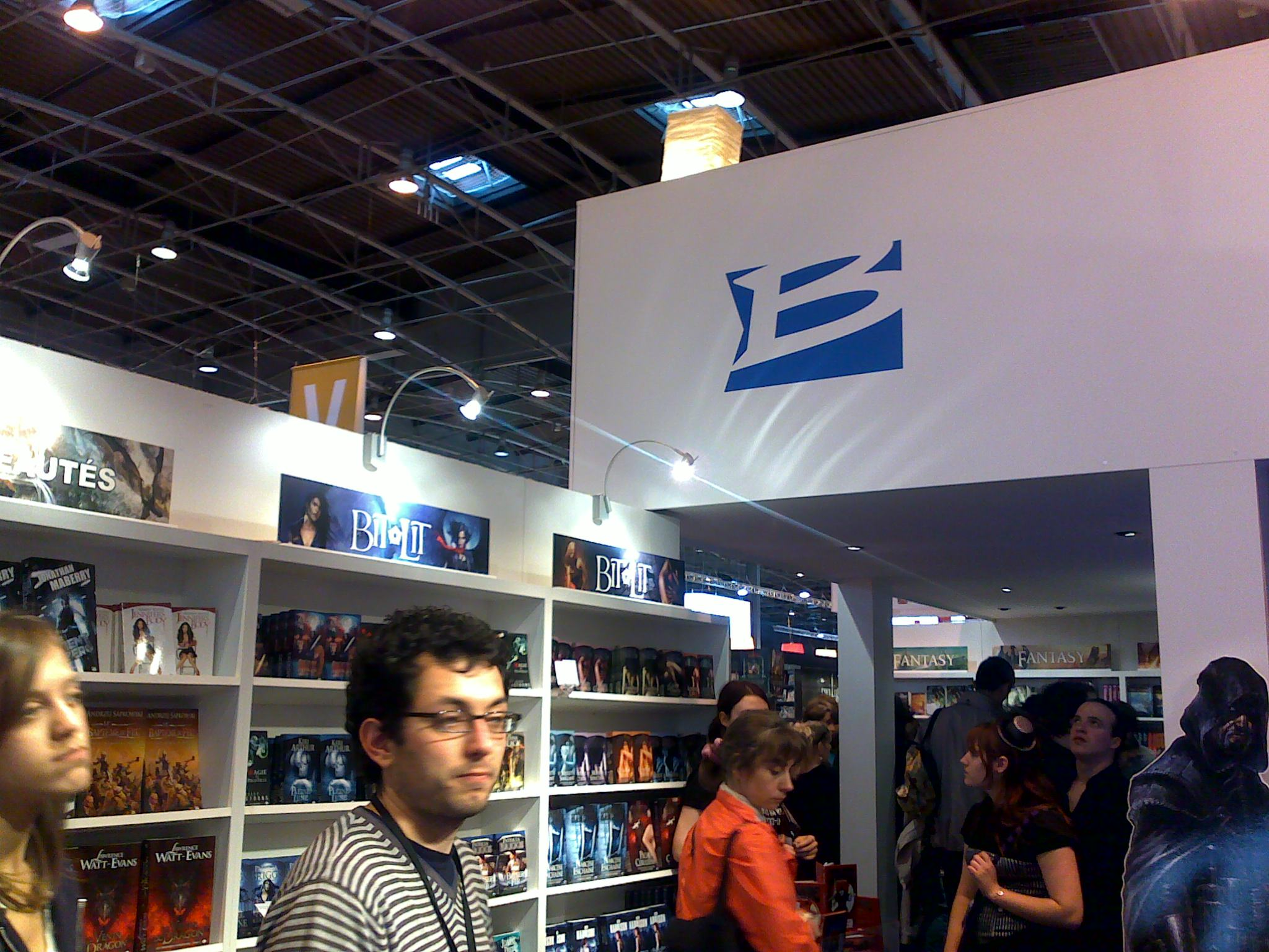 Le stand des éditions Bragelonne au salon du livre 2010